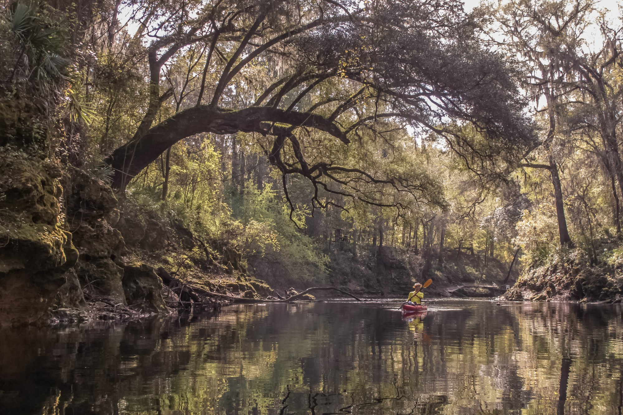 Alapaha River Rise